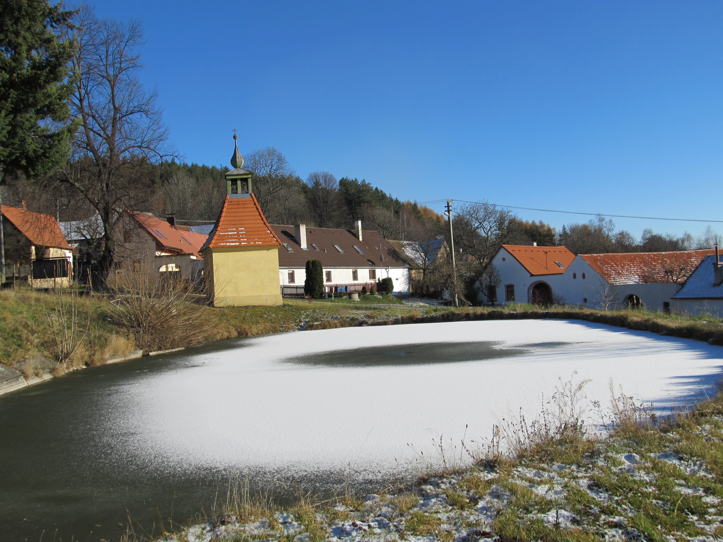 Uhřice - náves